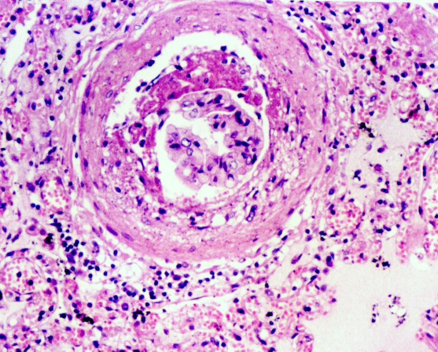 Glomeruloesclerosi d'etiologia Hipertensiva. Microscopi òptic. 400X. Tinció: H&E.